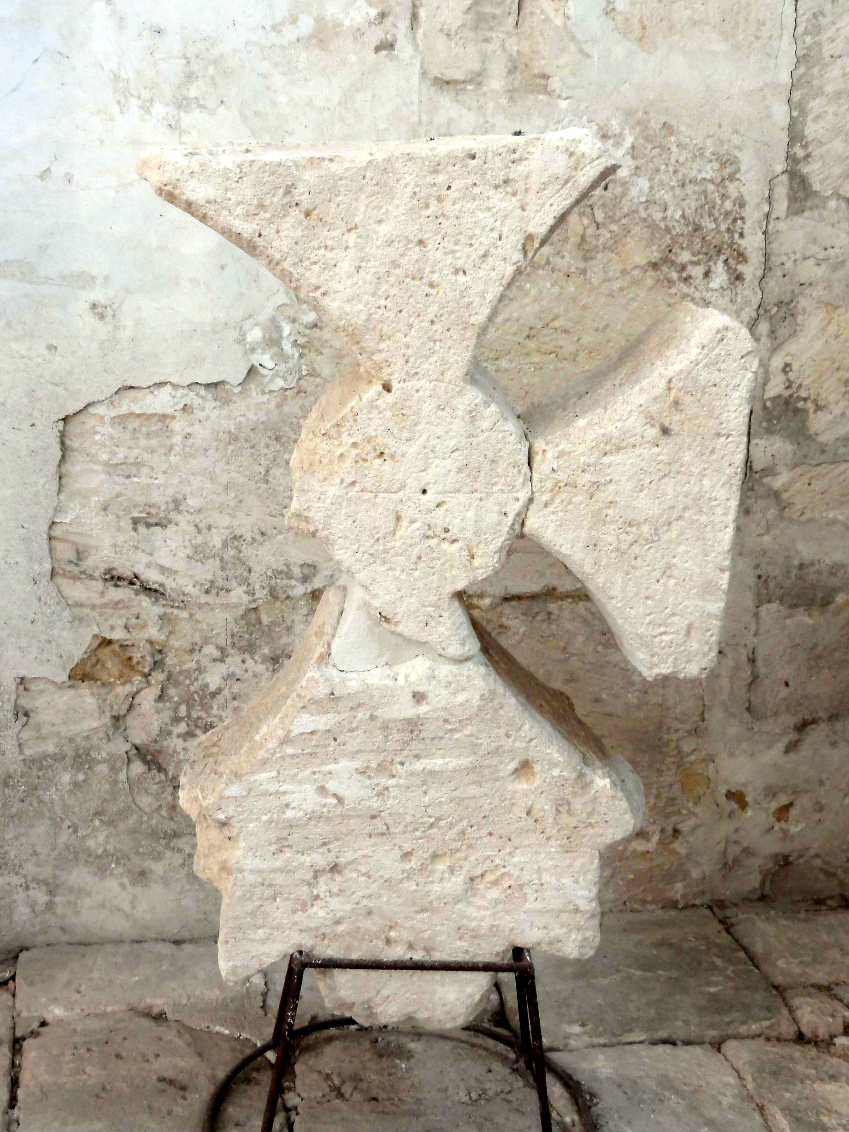 Mobilier de l'église Saint-Sulpice de Béthancourt-en-Valois - voir titre.